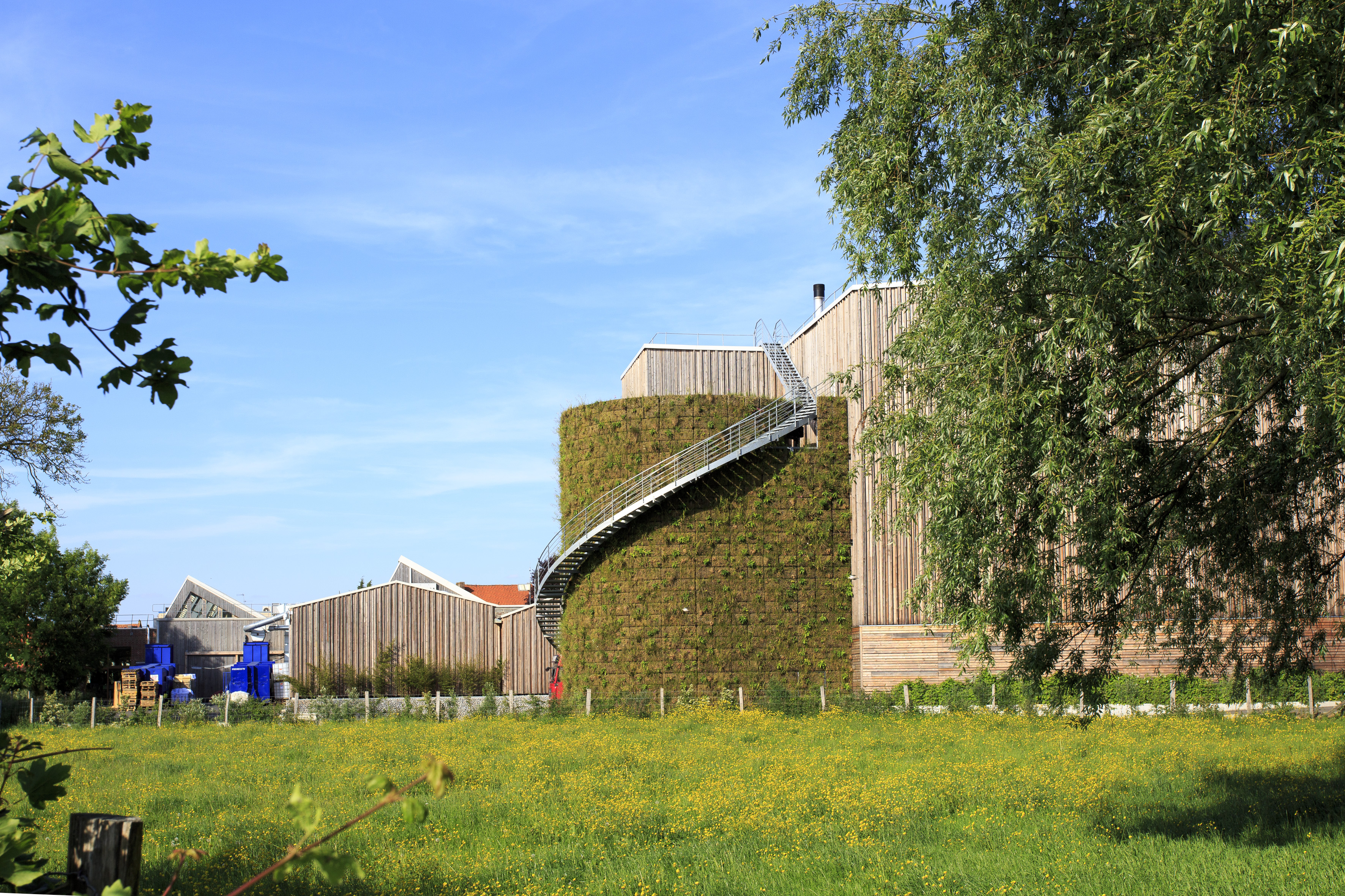 La cuve d'eau de l'usine Pocheco